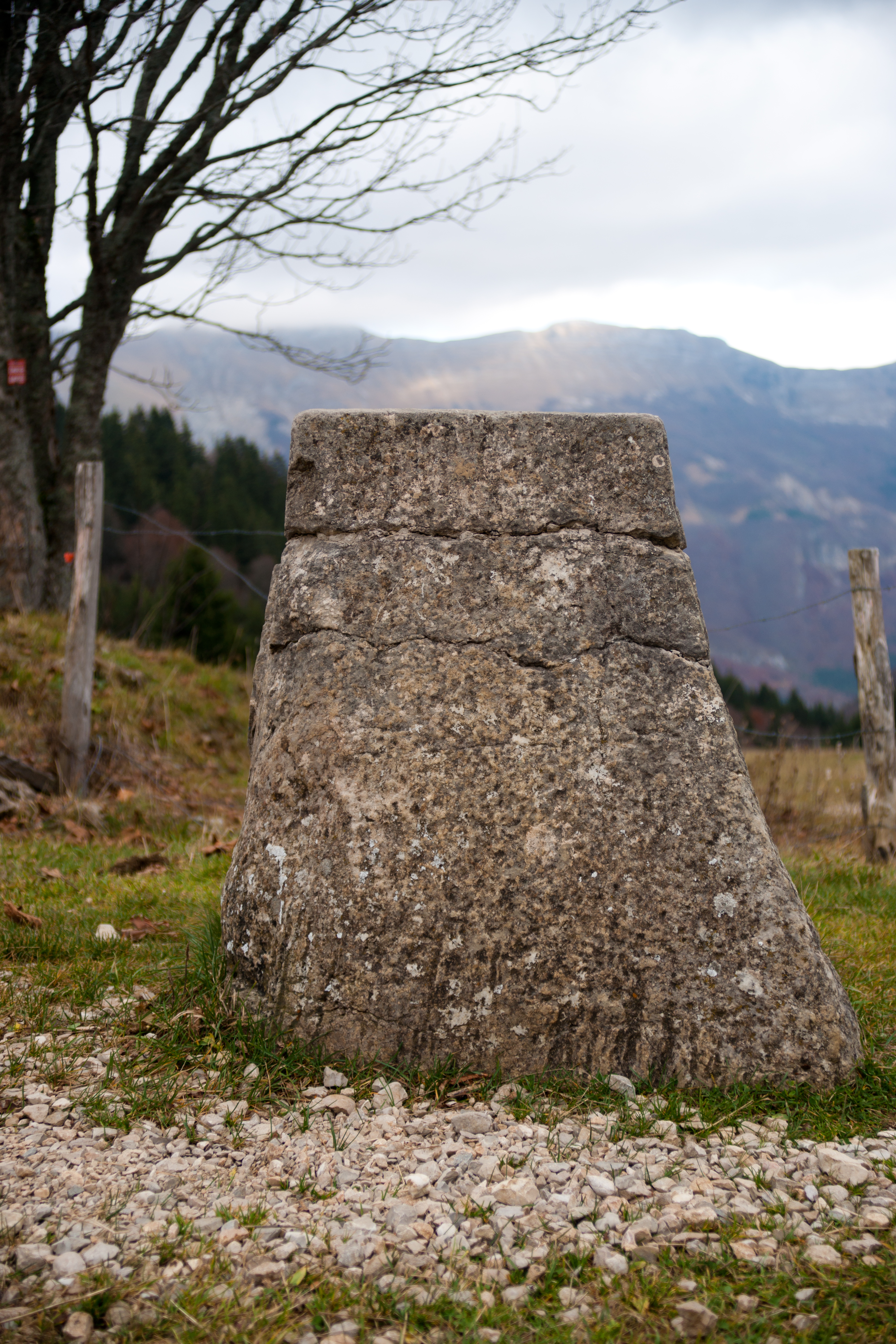 Borne frontière, la Borne au Lion. France.